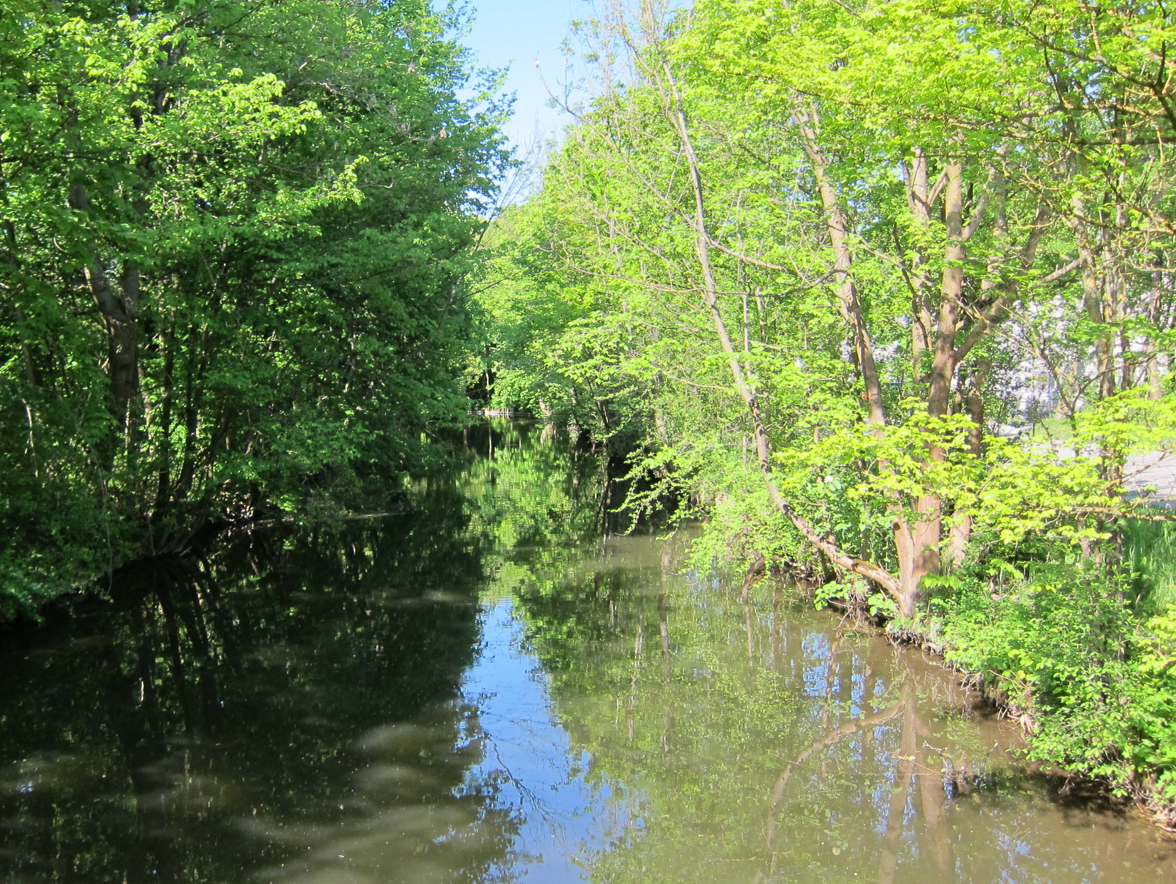 Würmkanal unmittelbar vor dem Schloss Schleißheim